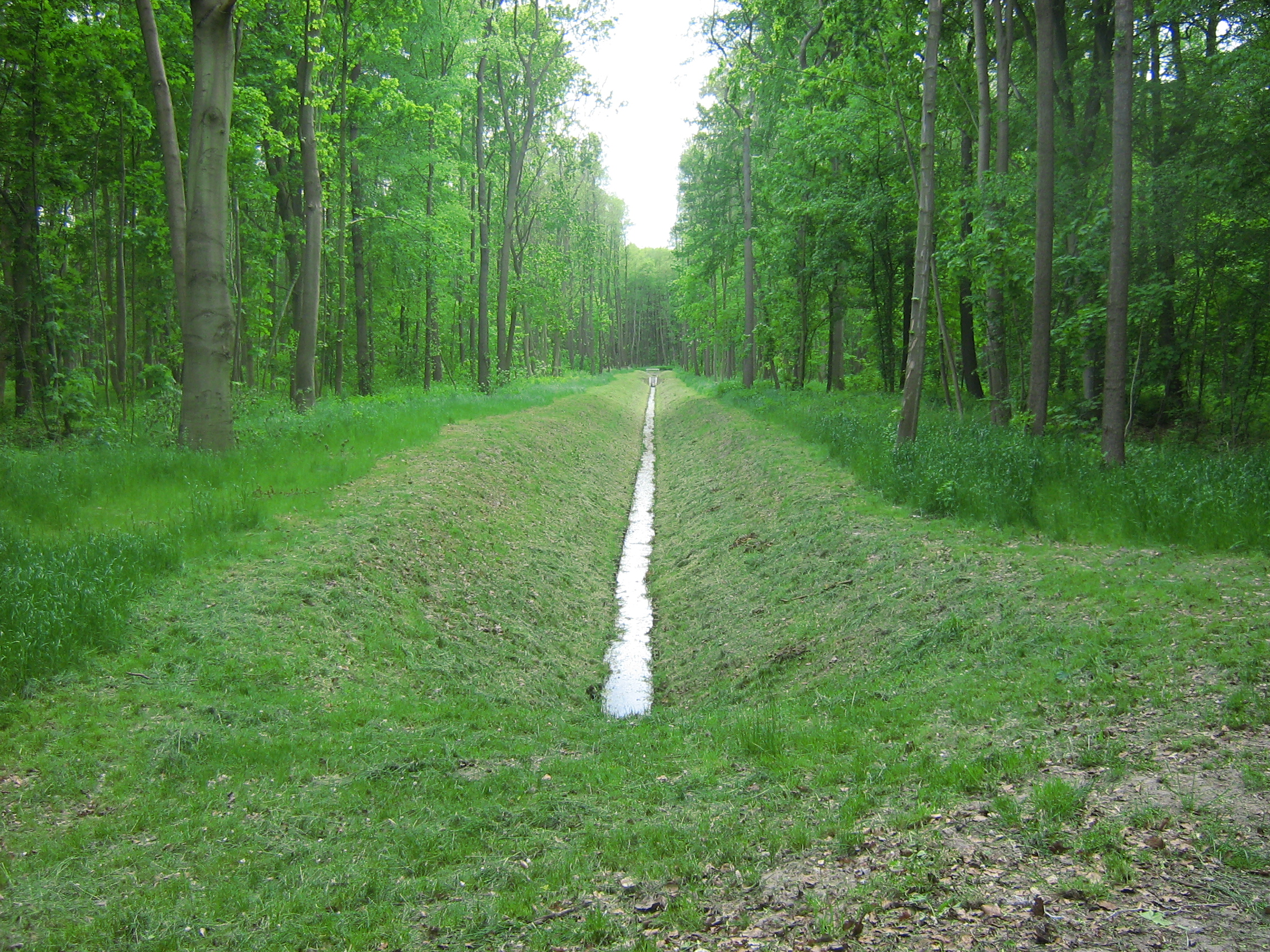 Kanał w parku zdrojowym w Świnoujściu